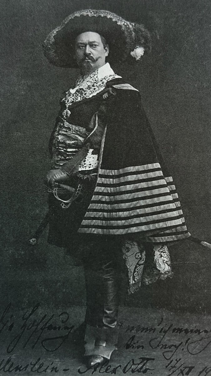 Otto Osmarr, Schauspieler und Intendant des Meininger Theaters.